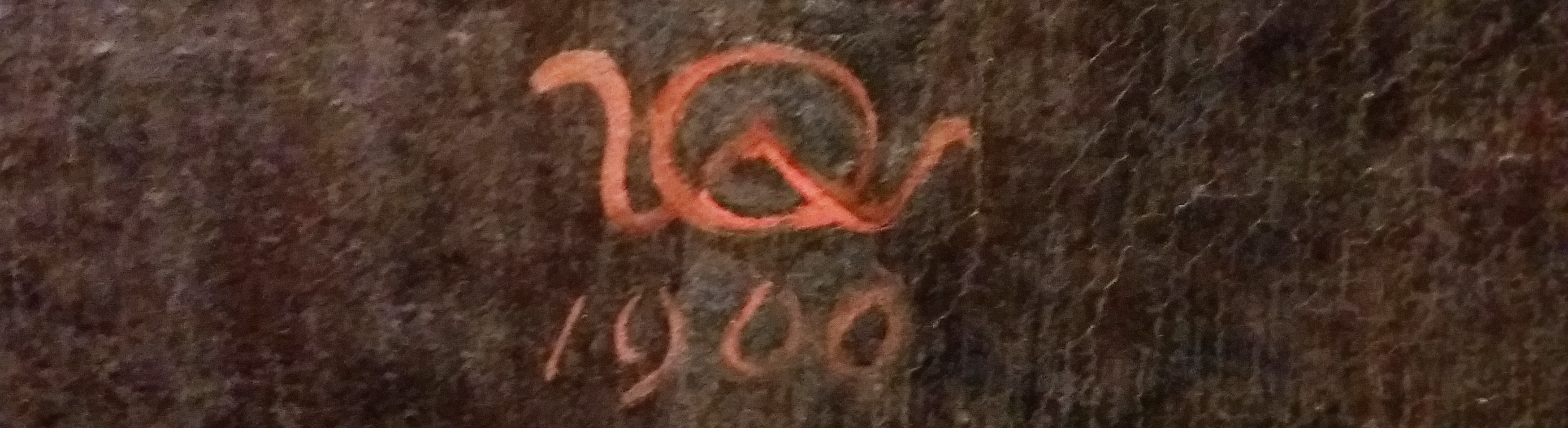 Walter Queck: Signatur des Künstlers